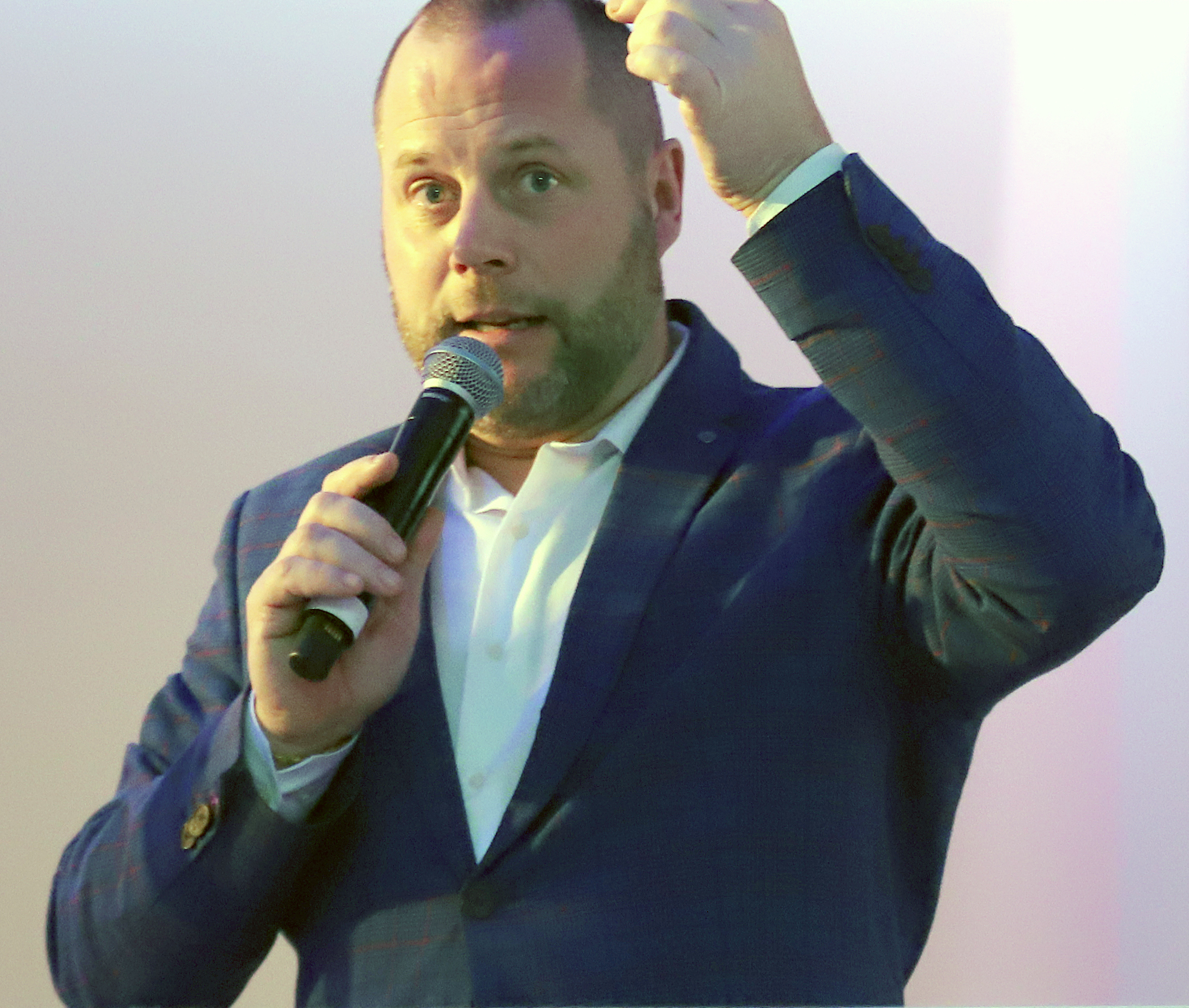 Arlet Palmiste, laulja ja õhtujuht, meremeeste klubi üritusel 2020